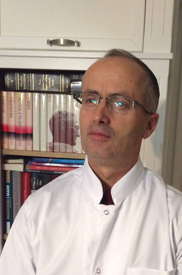 Aziz Mustafa